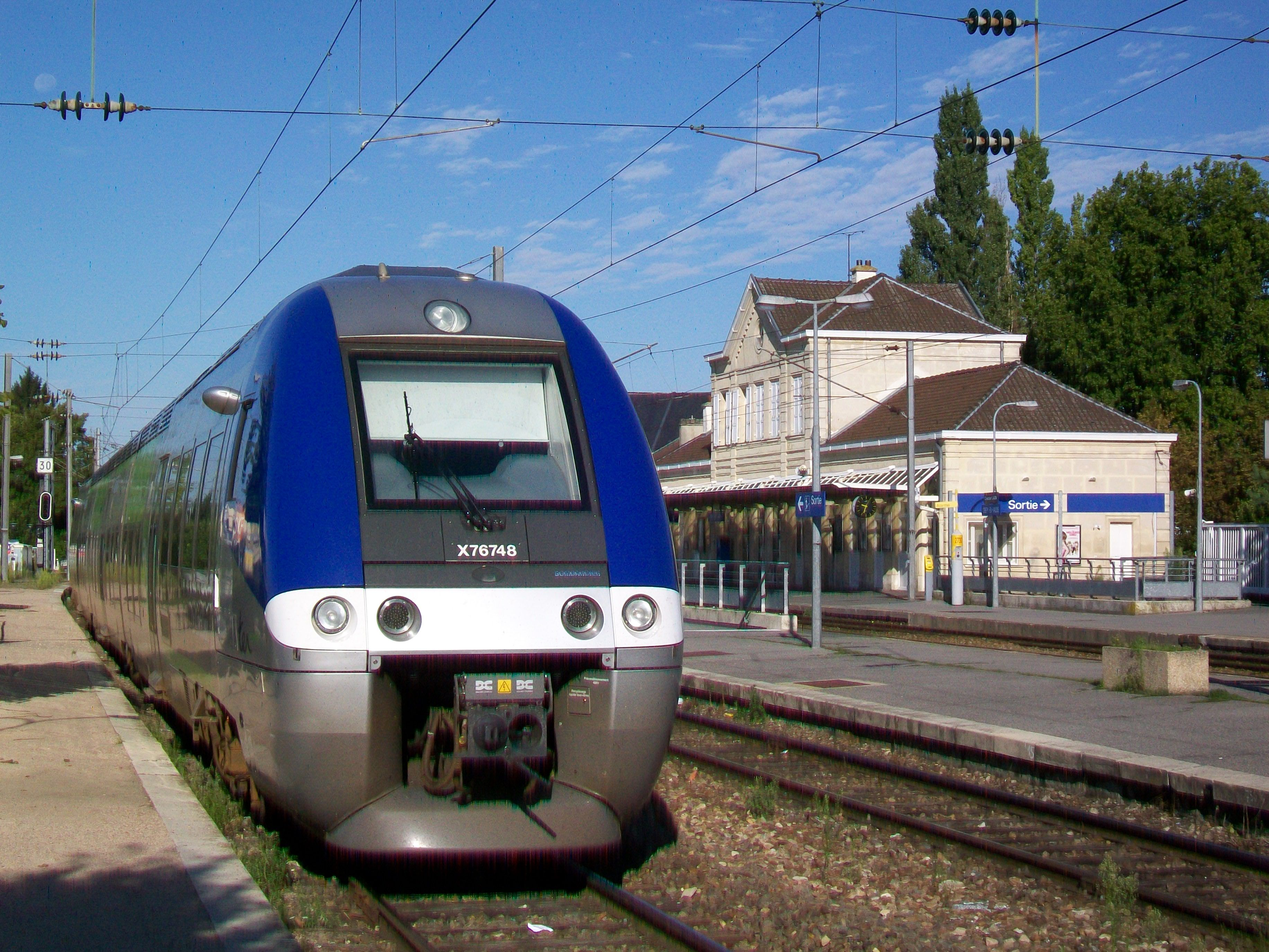 Autorail à grande capacité (AGC) X 76748 en gare de Crépy-en-Valois. Le troisième quai est très bas et non goudronné.